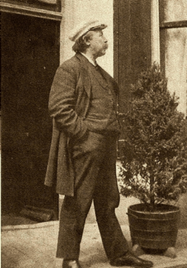 Foto van Wijbrandus Haanstra in Leiden.